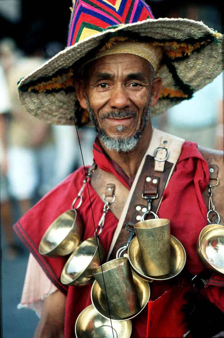 vendeur de Thé, à MarrakechMorocco 4